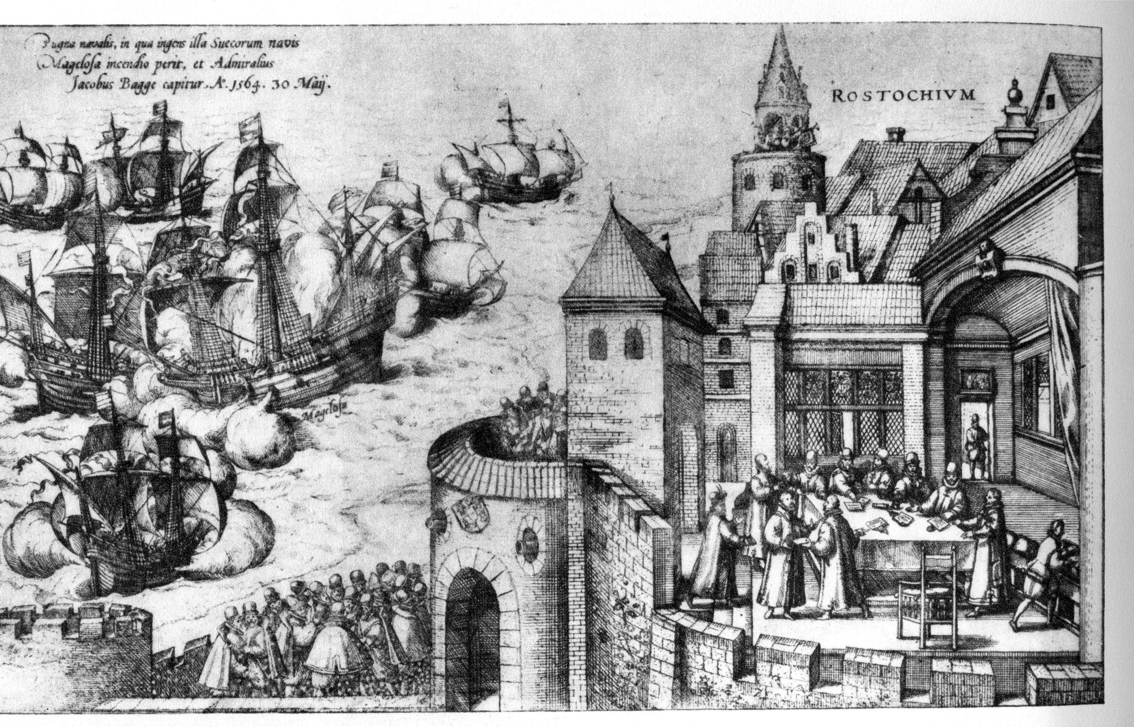 Die Grafik zeigt den Verlauf der Seeschlacht am 30./31.Mai 1564 in der Ostsee zwischen den Inseln Öland und Gotland zur Zeit des Dreikronenkrieges. In der rechten Bildhälfte sind die gescheiterten Friedenverhandlungen in der Stadt Rostock (ROSTOCHIVM) zu sehen. Die linke Bildhälfte zeigt die Kaperung des schwedischen Flaggschiffes MARS (auch bekannt als Makalös bzw. Jutehattaren) durch das Lübecker Flaggschiff "Der Engel" sowie weitere Schiffe der dänisch-lübecker Flotte. Die Seeschlacht endete mit der Versenkung der Mars und der Gefangennahme des schwedischen Befehlshabers Admiral Jakob Bagge sowie seinem Stellvertreter Arvid Trolle.